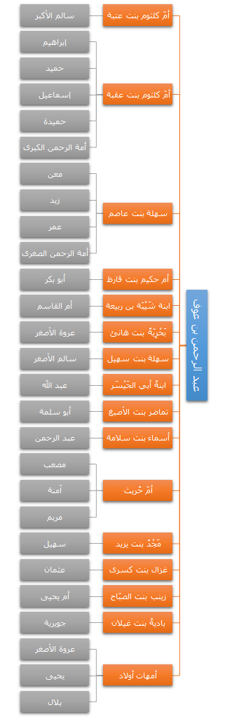 شجرة أزواج وأبناء الصحابي عبد الرحمن بن عوف